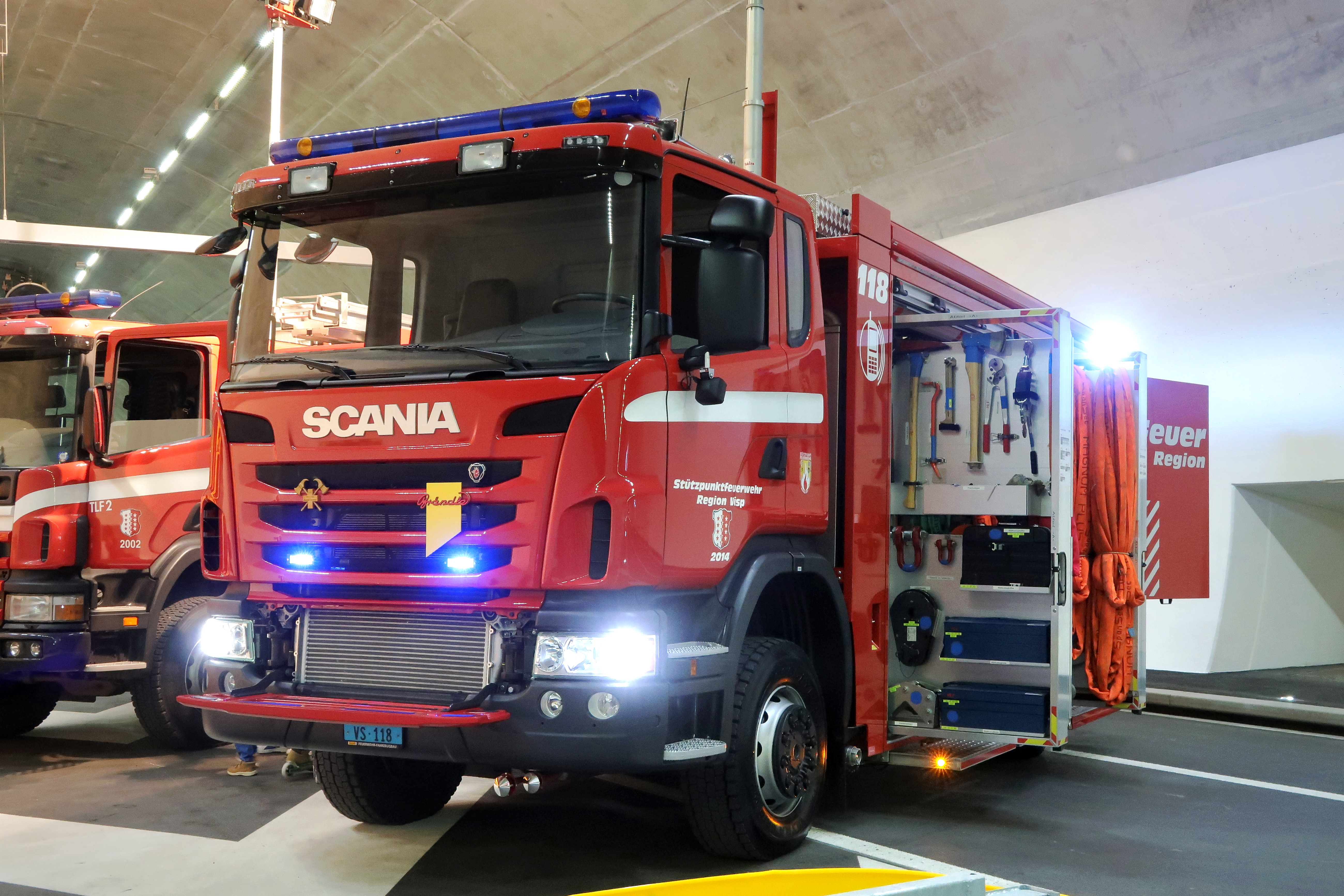 HLF (Scania G 440) der Stützpunktfeuerwehr Region Visp